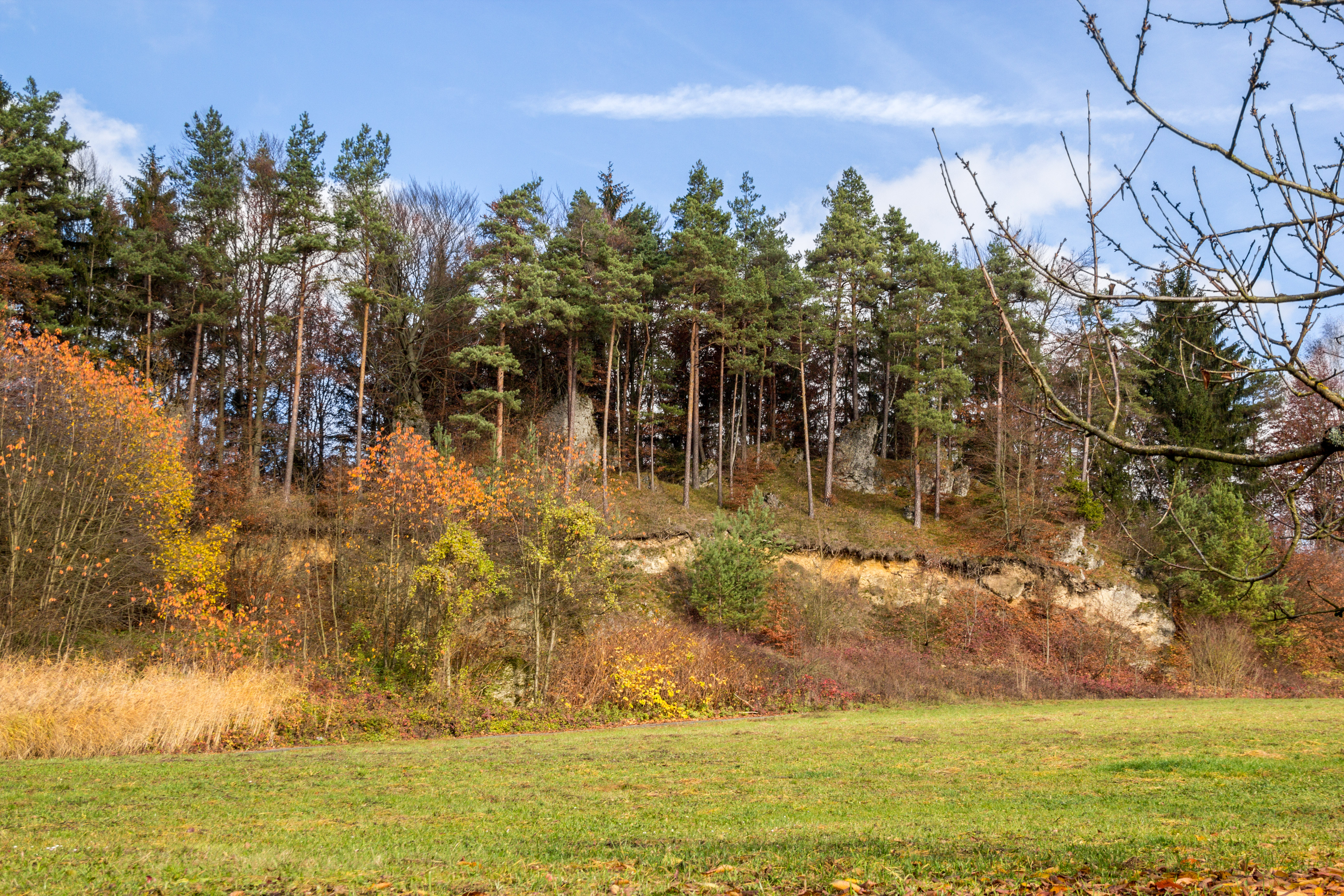 Felsen, Geotop, Affalterthal